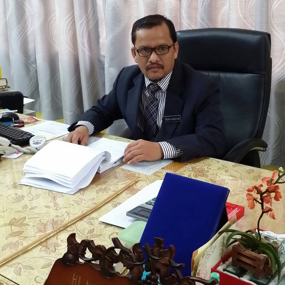 Tuan Haji Nor Hashim Bin Haji Othman